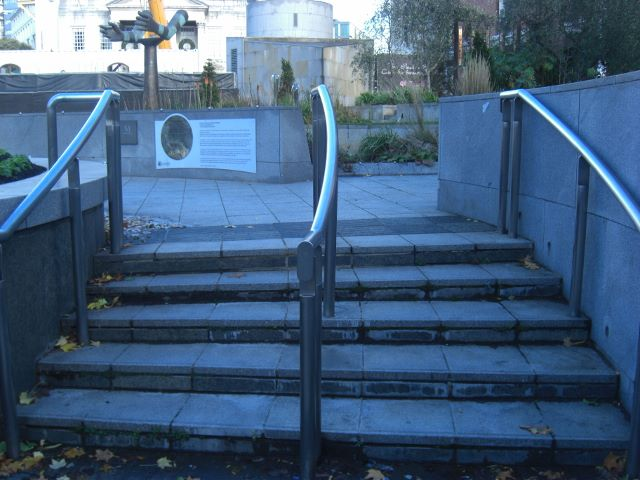 Chemin vers La Liberté